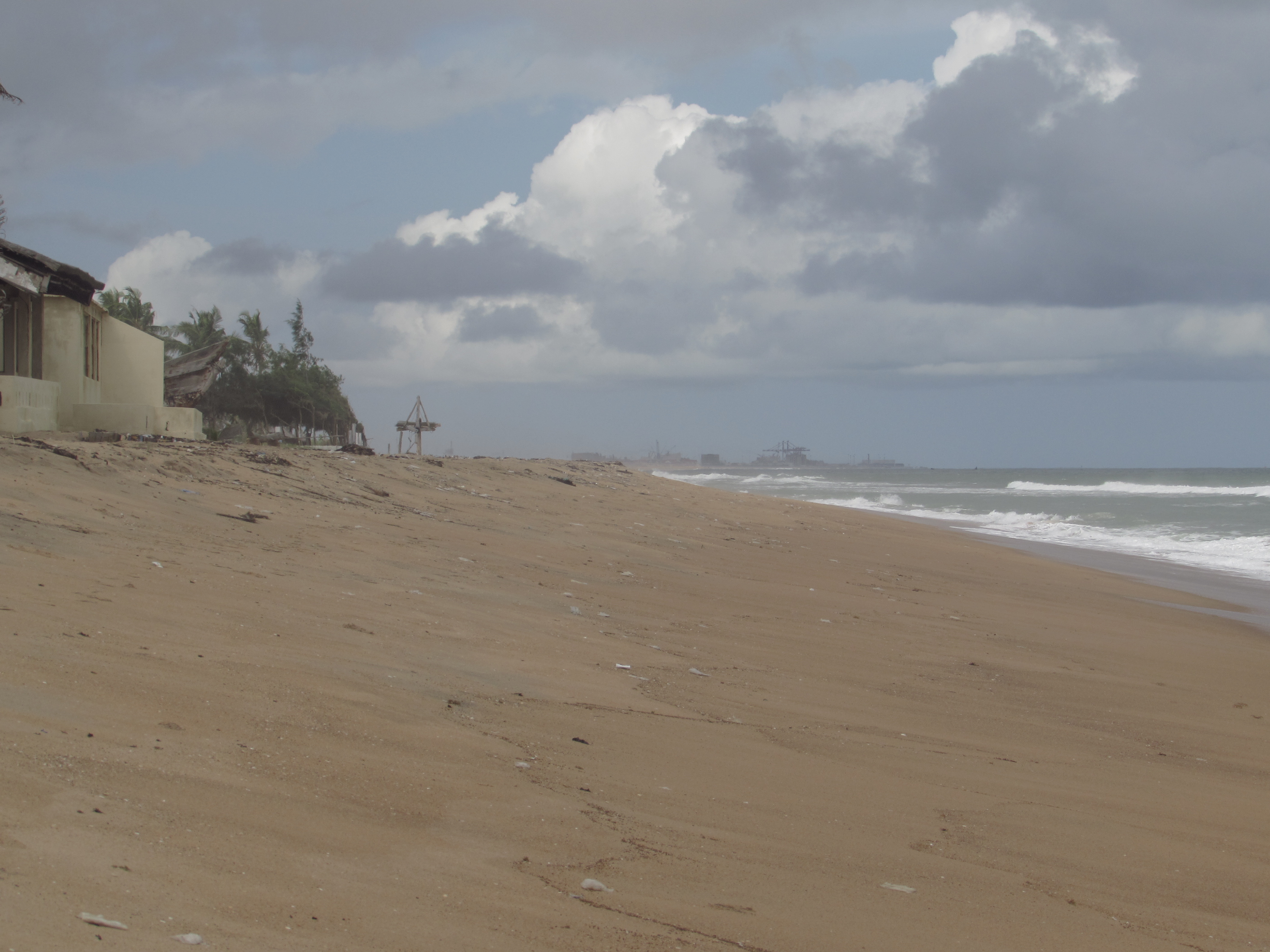 Küste in Benin; im Hintergrund der Hafen Cotonou